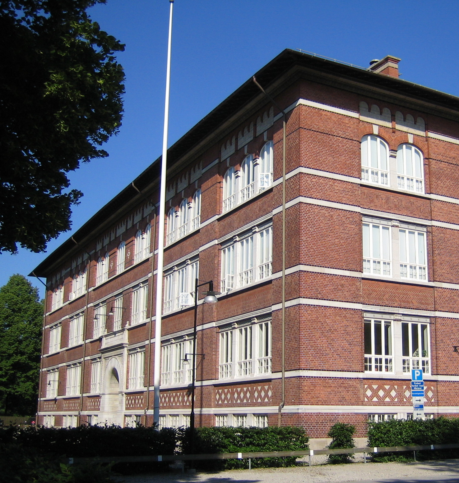 Malmö Art Academy.